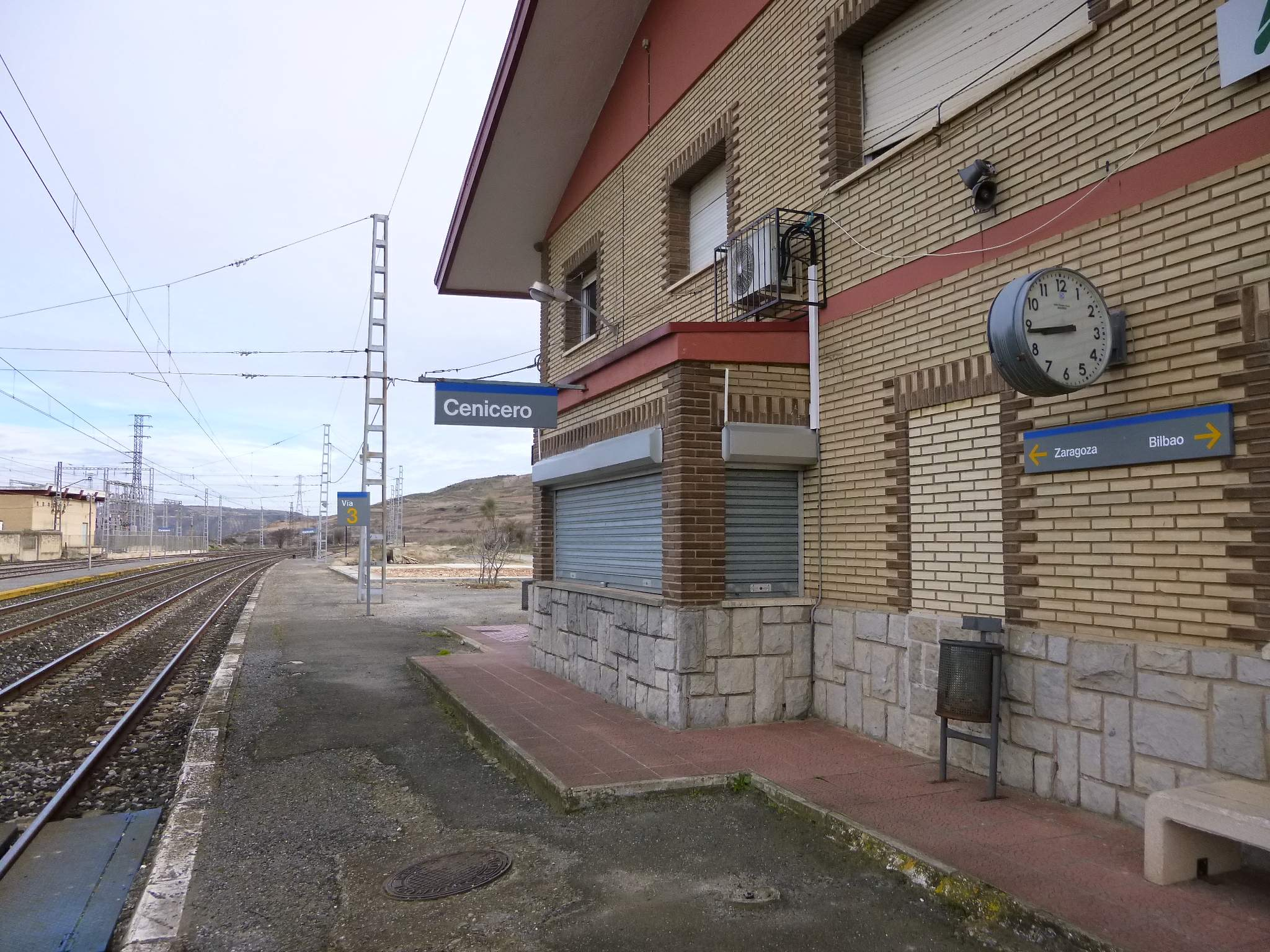 Cenicero (La Rioja, España) - Antigua estación de tren (fuera de servicio)